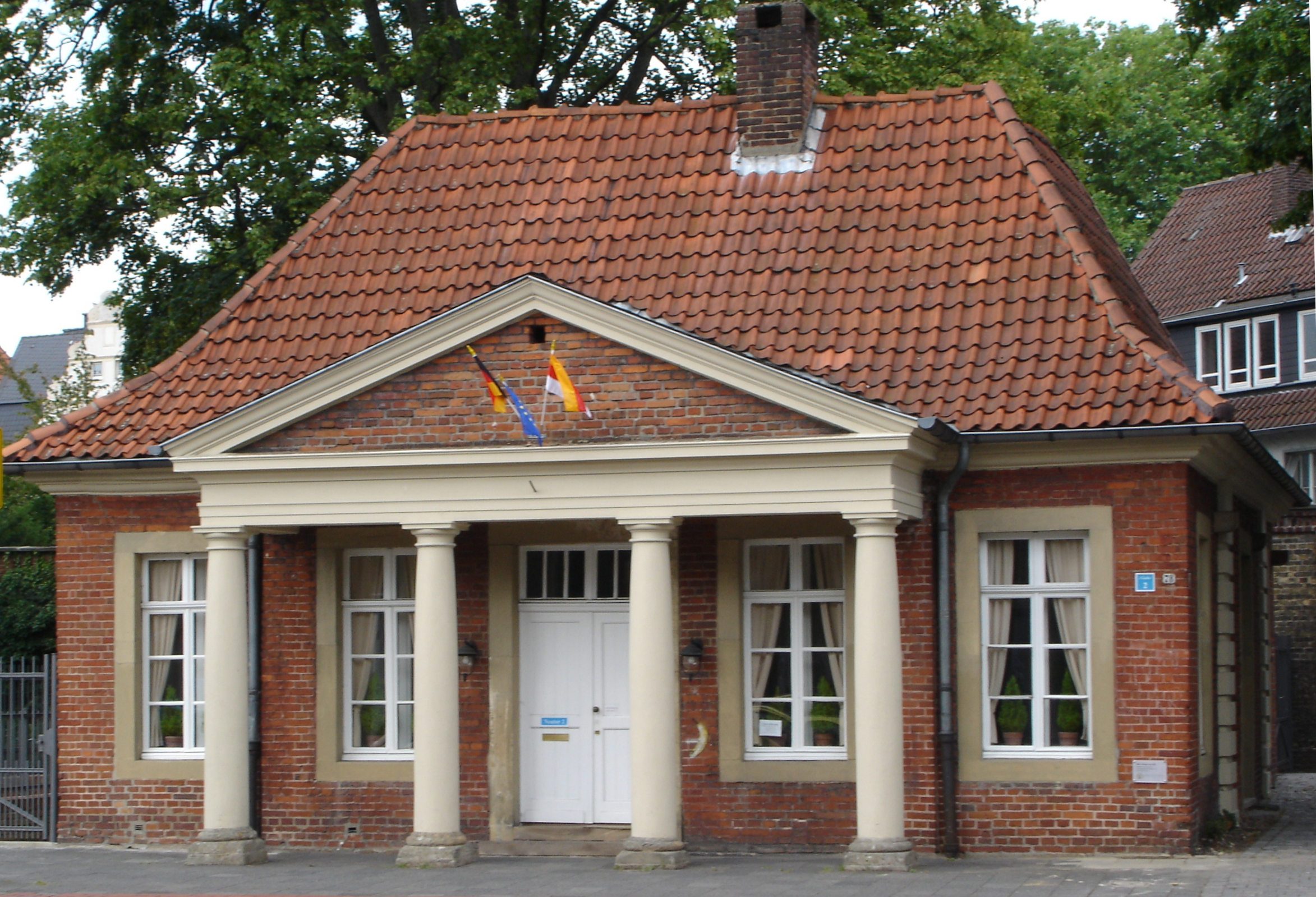 Östliches Torhäuschen am Neutor in Münster, Westfalen, Germany